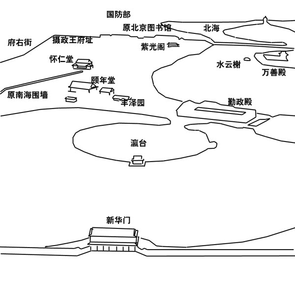 中南海主要建筑位置示意图的图释